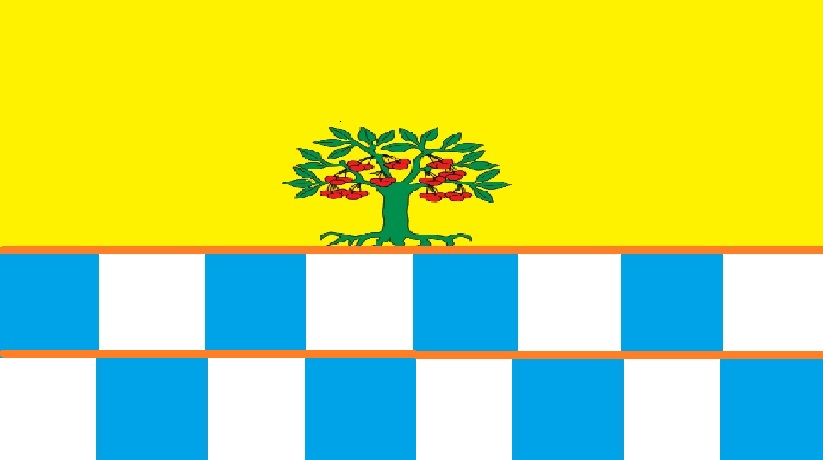 Estremeñu: Donada para el pueblo basada en el escudo. si no gusta la cambiamos